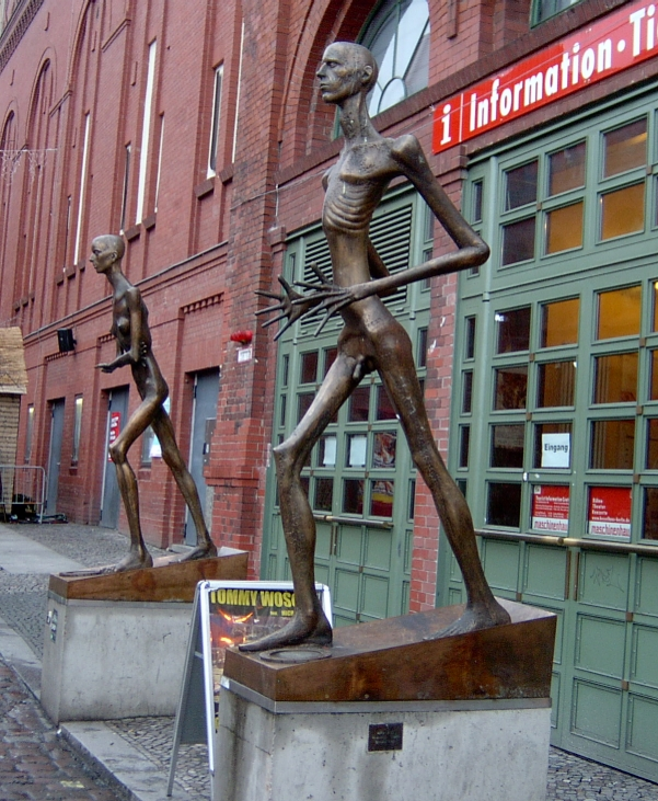 Bronzeskulpturen "Adam und Eva" by Rolf Biebl (1986-88) auf dem Hof der Berliner Kulturbrauerei/Germany